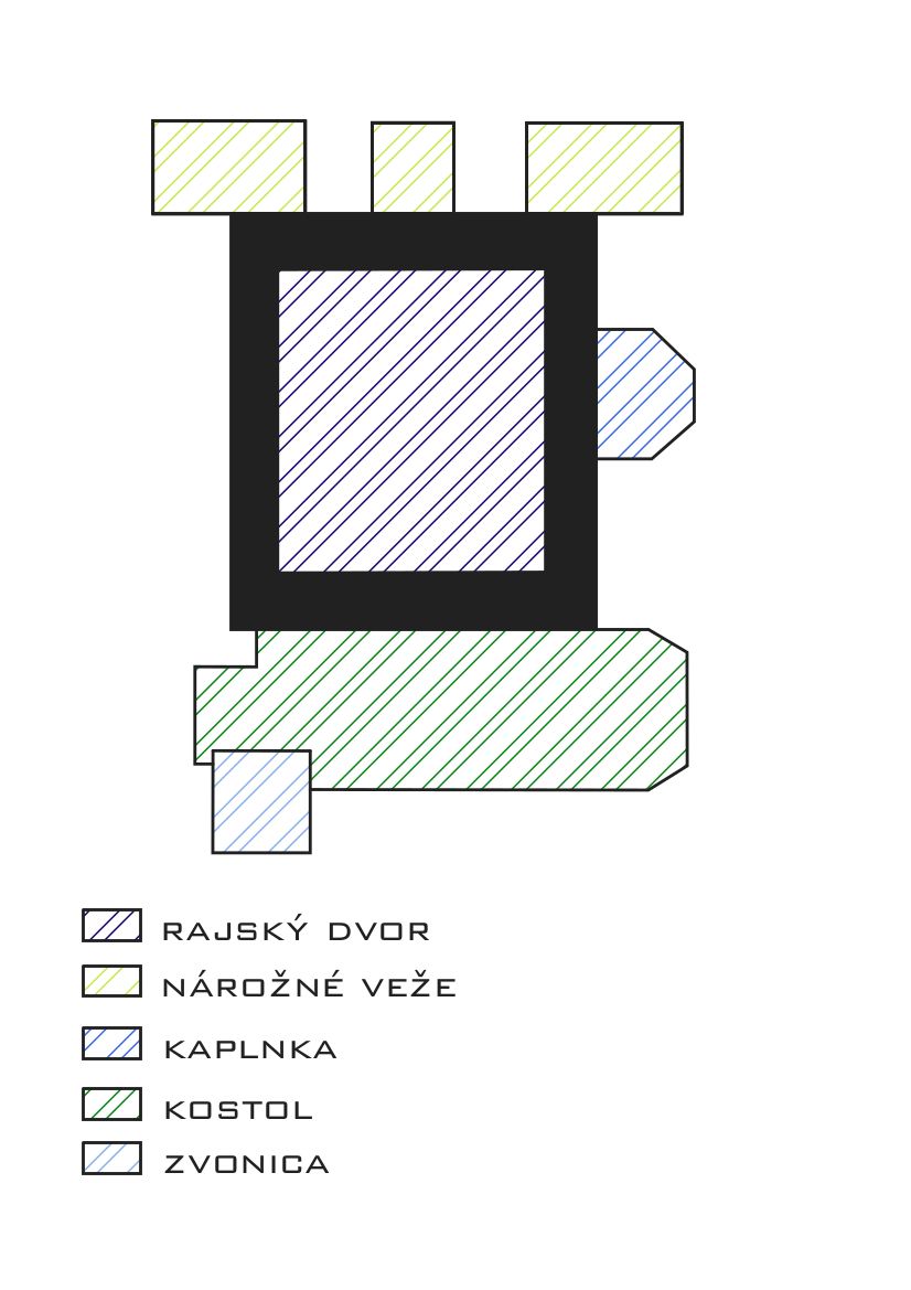 Podorys klastora v Lelesi